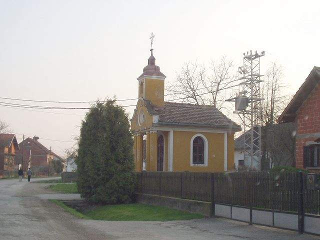 centar sela Prilesja sa kapelicom